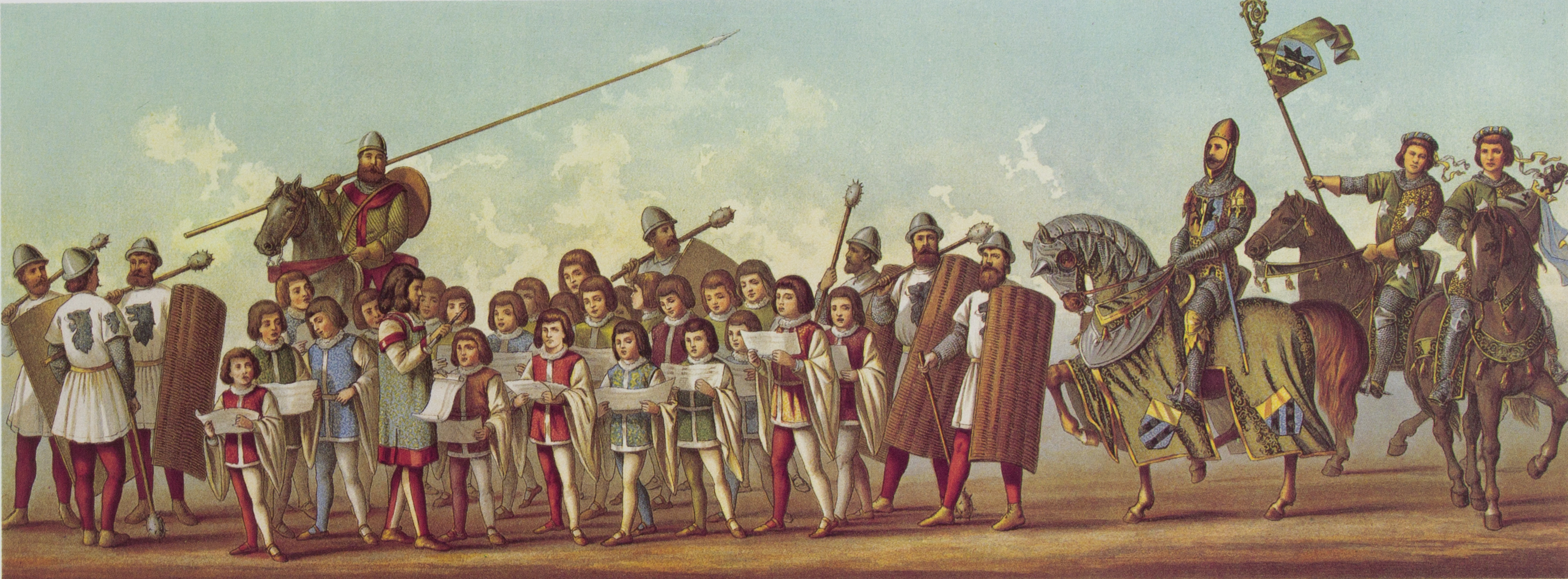 Tony Avenarius: Historischer Festzug veranstaltet bei der Feier der Vollendung des Kölner Doms am 18. October 1880. Tafel XVII